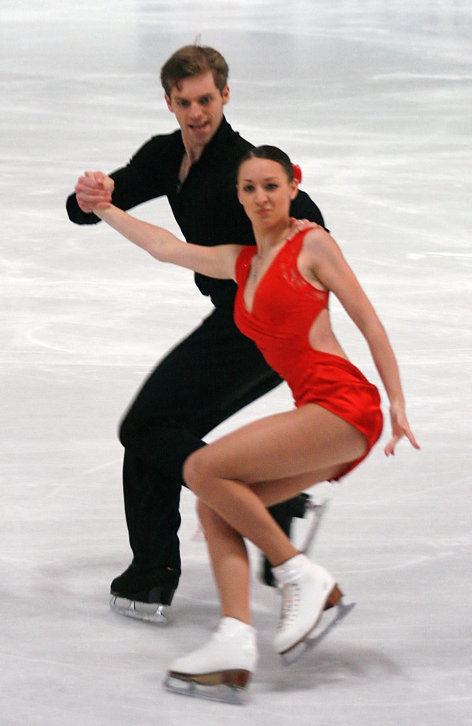 Ангелина Телегина и тар Джапаридзе (Грузия) на 2013 Nebelhorn Trophy